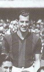 Angel Zubieta at San Lorenzo